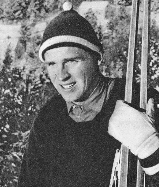 Klas Lestander